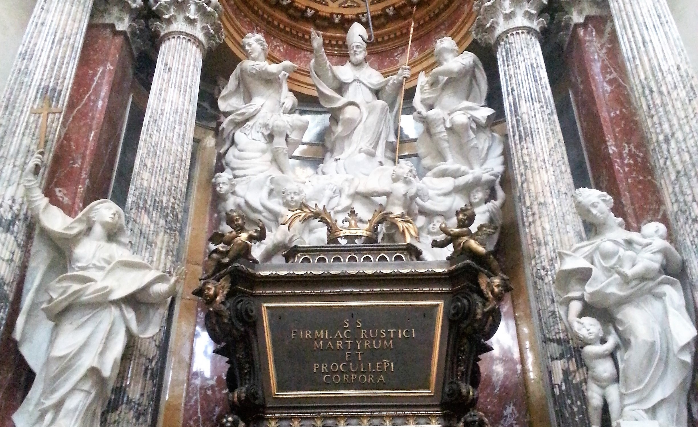 Altare dei santi Fermo, Rustico e Procolo del Duomo di Bergamo